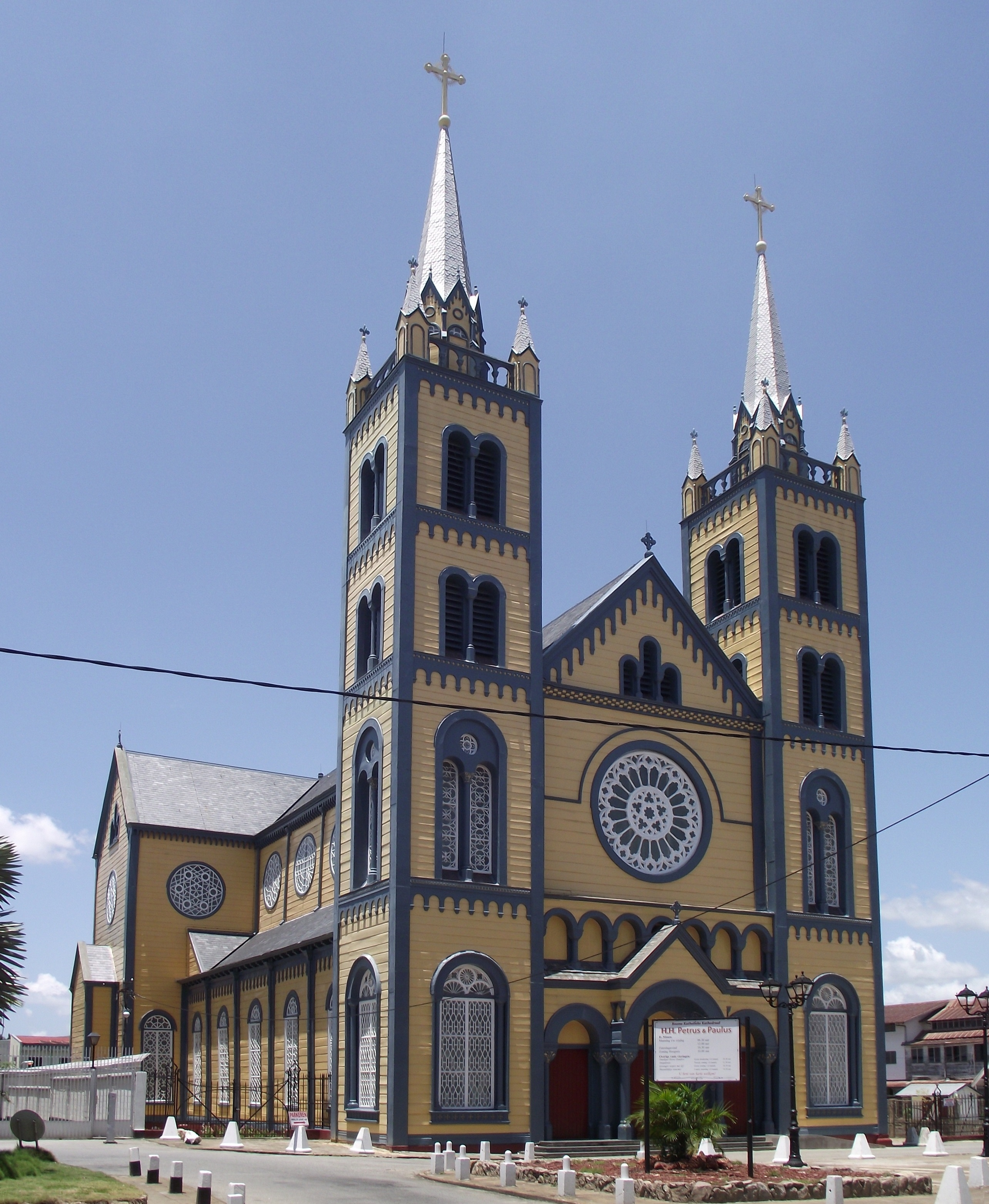 Sint-Petrus-en-Pauluskathedraal (Paramaribo, Suriname). Dubbel torenfront.